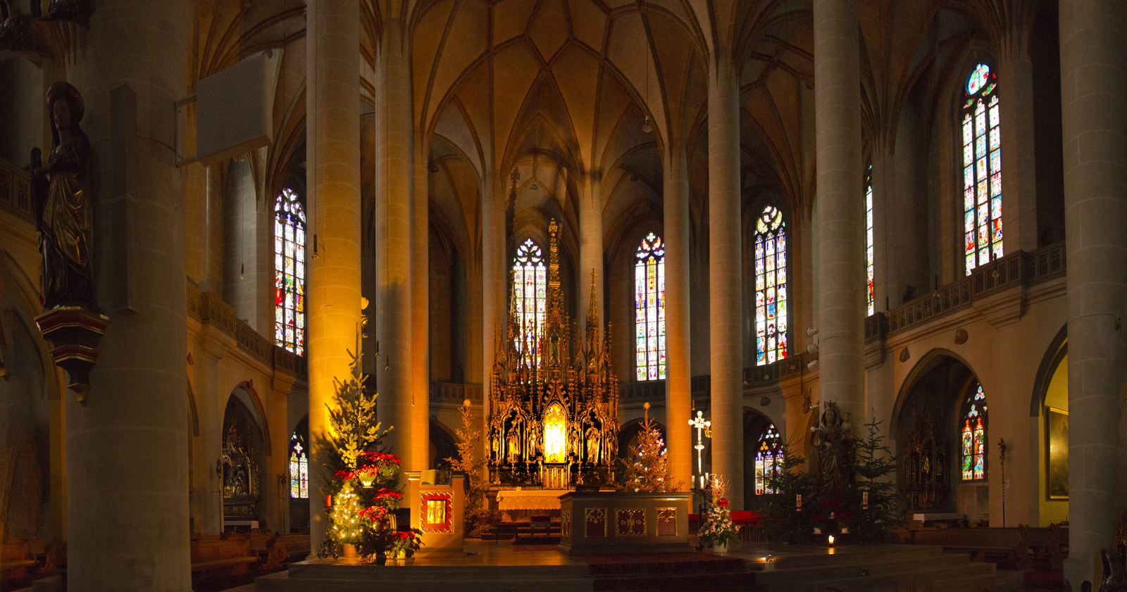 Altar der St. Martinskirche in Amberg /OPf.